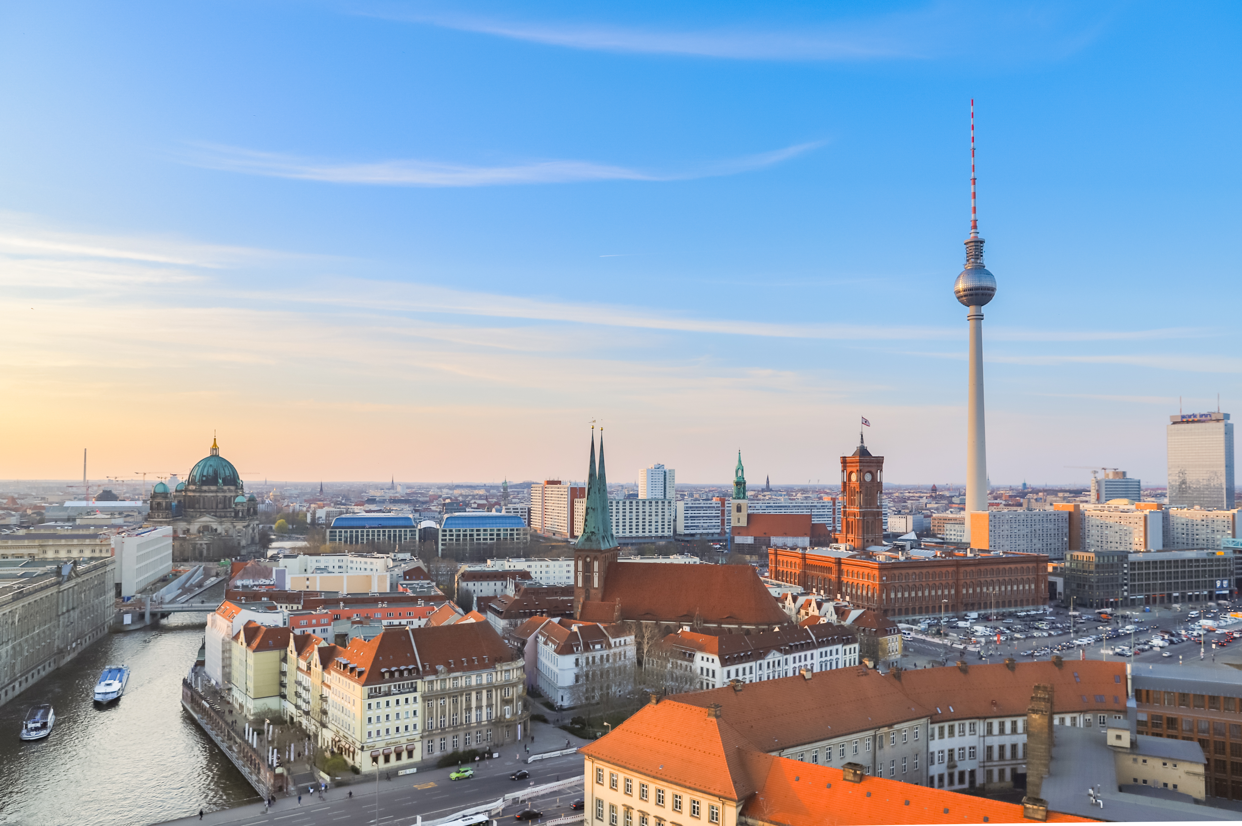 Berlin Germany